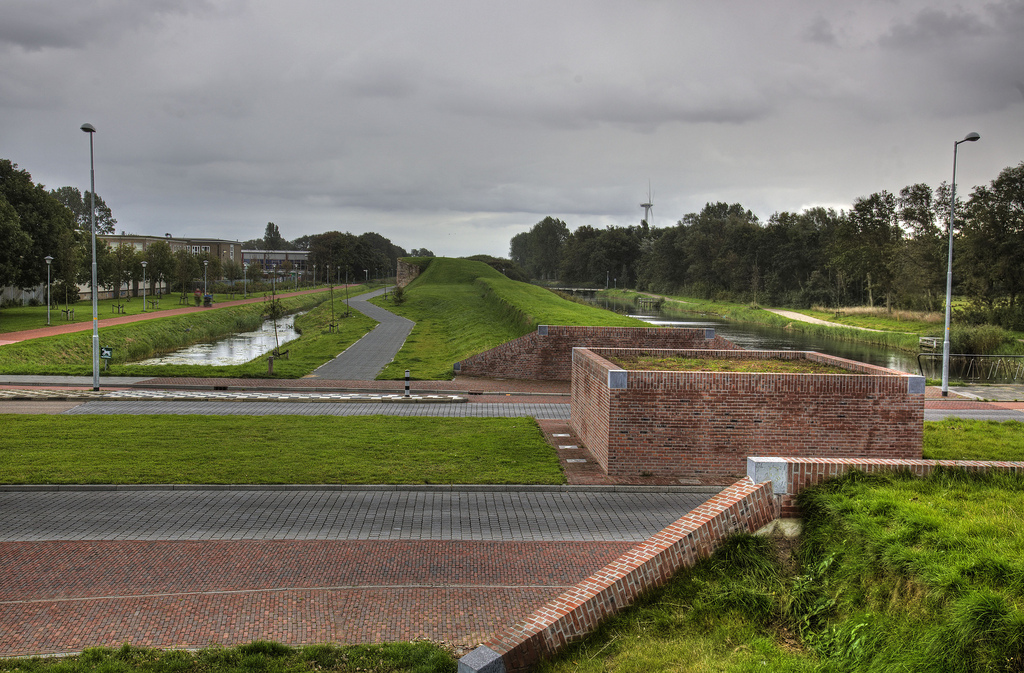 Volgens het door Napoleon vastgestelde ontwerp tot bevestiging der Stelling van Den Helder (Maart 1812) zouden de forten Lasalle (Erfprins) l'Ecluse (Dirks Admiraal) en Dugommier (West- en Oostoever) met elkaar verbonden worden door een verbindingswal met achtergelegen kanaal. Door de verschillende oorlogen is aan de linie veel gebouwd en gesloopt. April 2009 in men begonnen met de aanleg van een coupure (de plek waar de linie wordt doorsneden door de Middenweg), deze wordt voorzien van aan weerszijden gemetselde muren. Van origine waren deze gemetselde coupures niet aanwezig in Den Helder. Bron